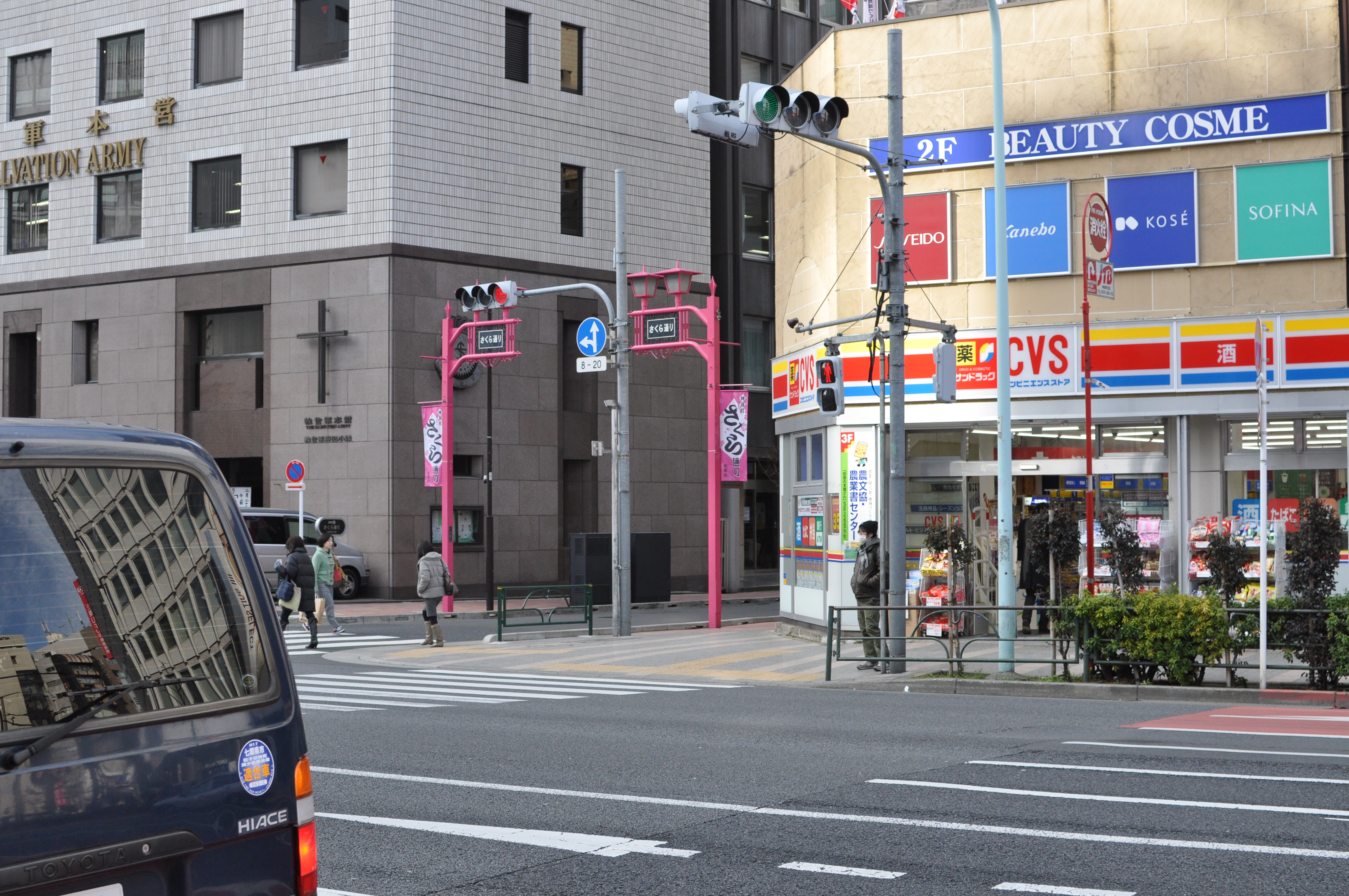 さくら通り 救世軍本営